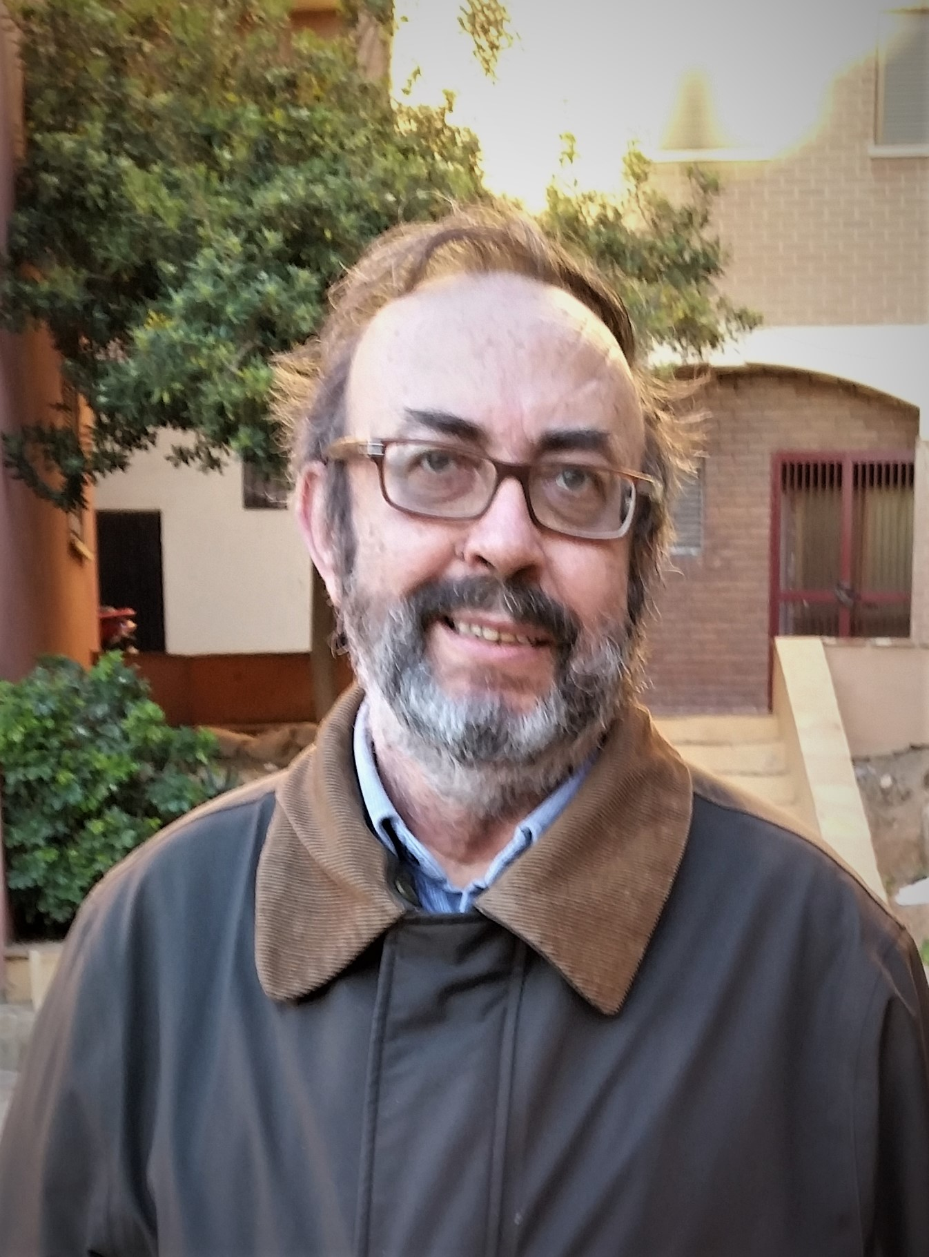 Javier Redal, escritor de Ciencia Ficción. En la puerta de su casa en 2014.